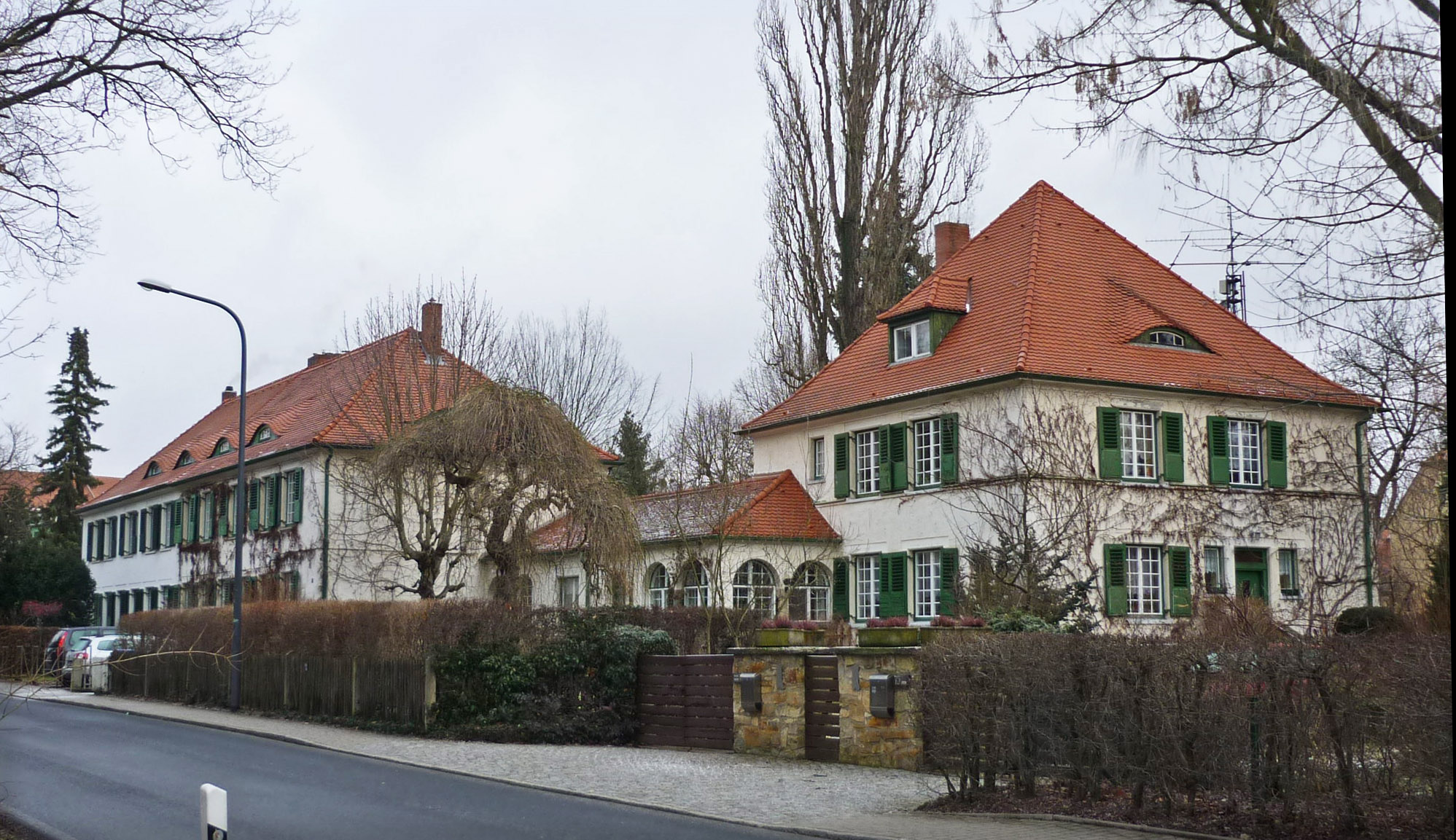 Villa Schmidt und Mendelssohn in Dresden-Hellerau, Moritzburger Weg 69